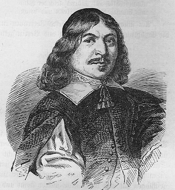 Georg Neumark (geb. 1621, gest. 1681) /aus: Illustrierte Literaturgeschichte, Autor: Otto von Leixner, Leipzig 1880